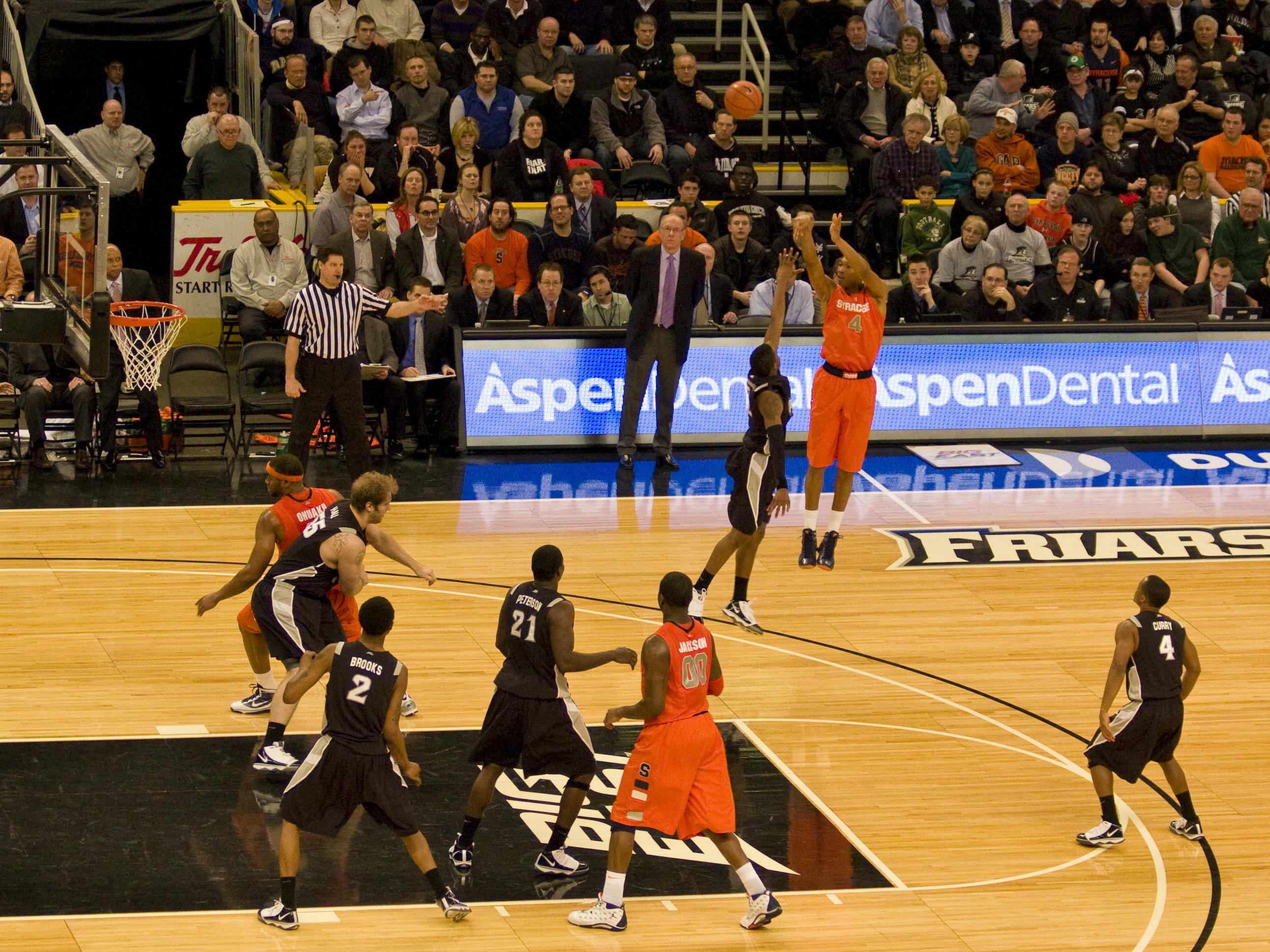 Wesley Skies